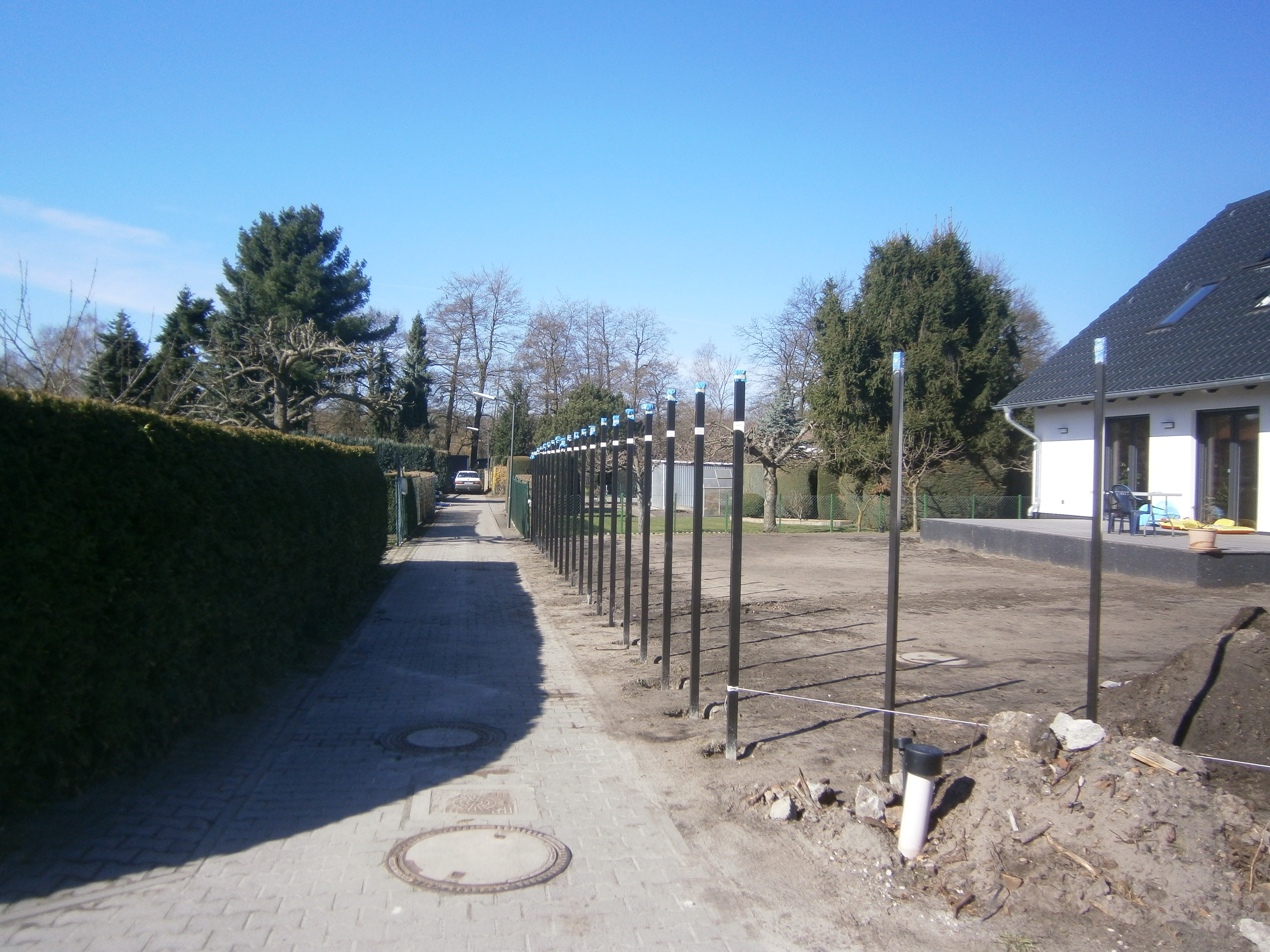 Die Siedlung Beusselsche Erben ist eine Garten- und Siedlerkolonie in Berlin-Tegel, Bezirk Reinickendorf, auf den Mäckeritzwiesen. Hier der Weg D durch die Siedlung.